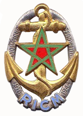 Insigne régimentaire du RICM